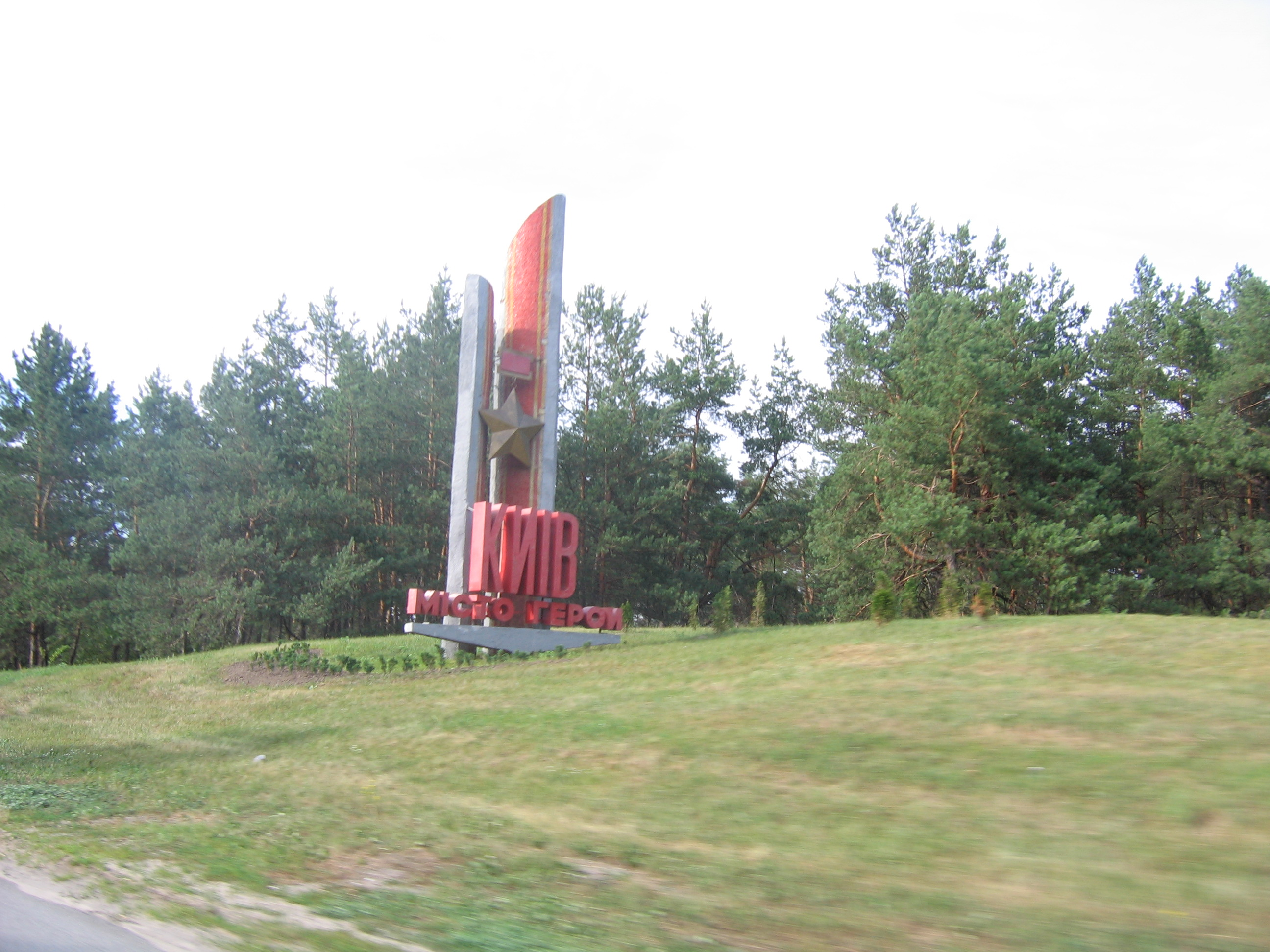 "Київ місто герой" - Столичне шосе